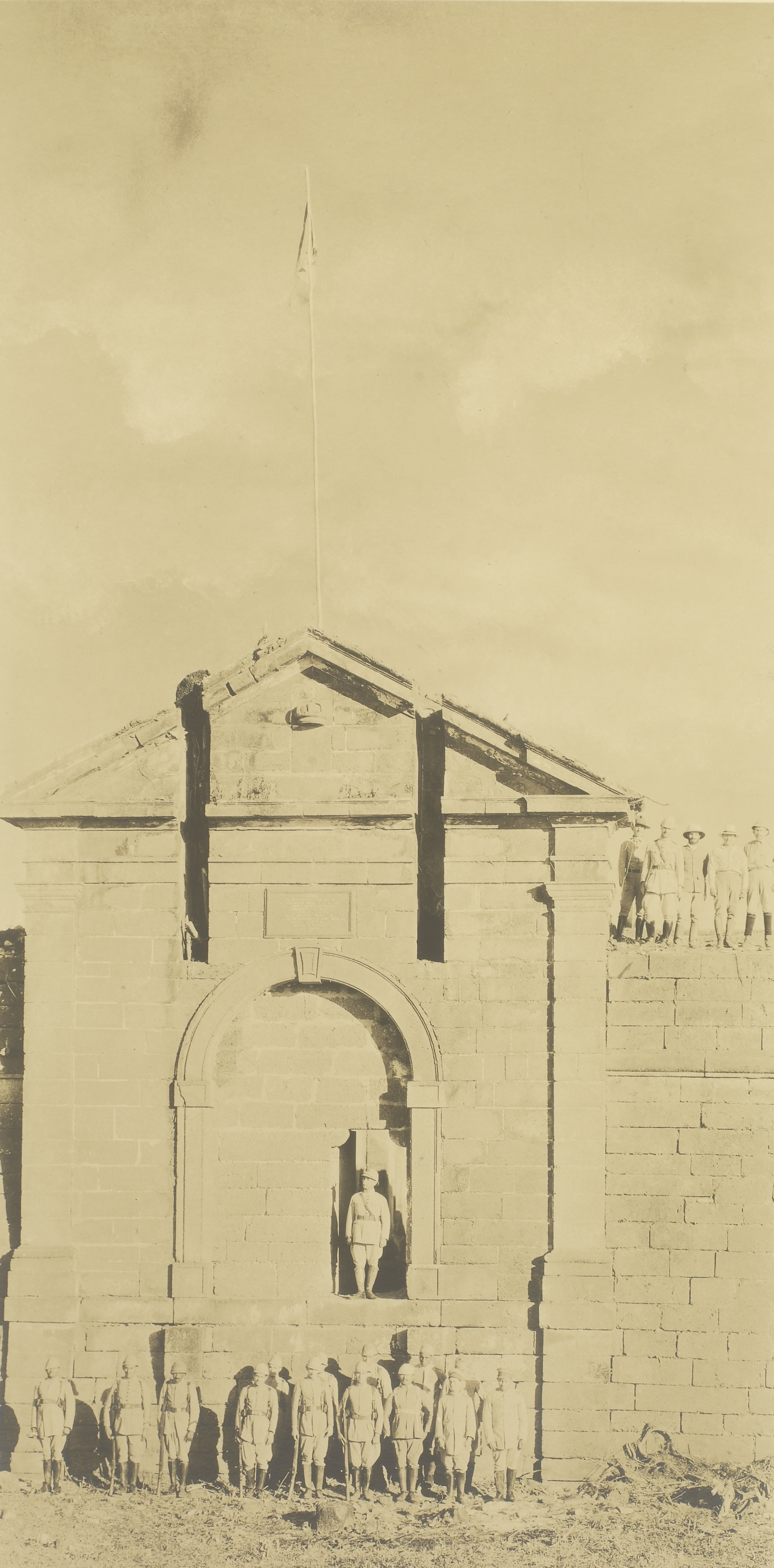 Imagem do Fundo Ministério da Guerra, do Arquivo Nacional